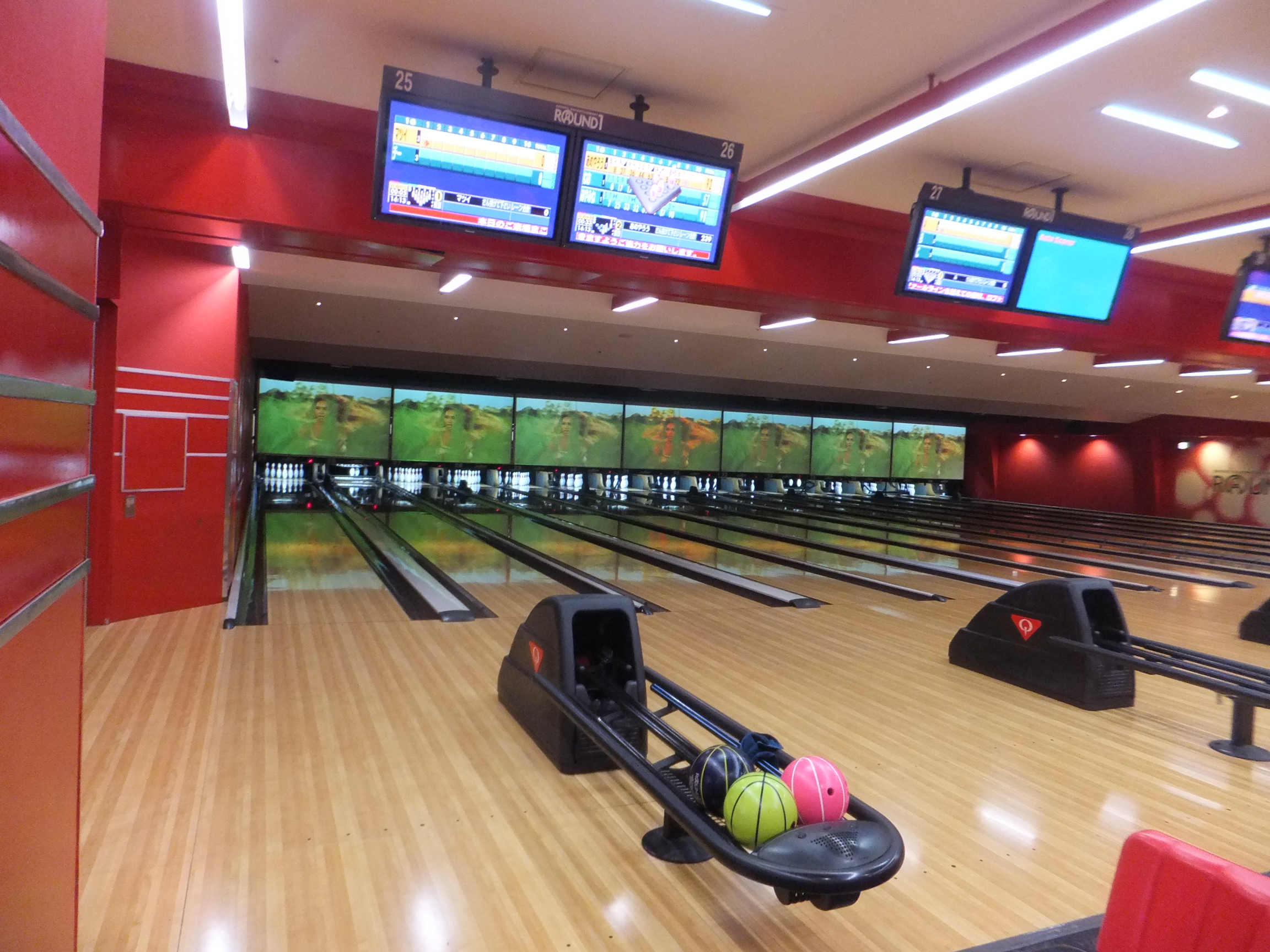 ラウンドワン三宮駅前店